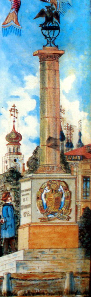 Демидовский столп. C вида Ярославля рисунка Г.П. Сабанеева. 1904. Ярославский музей-заповедник.